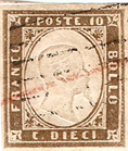 Timbre de Sardaigne de 1858 (10 c)